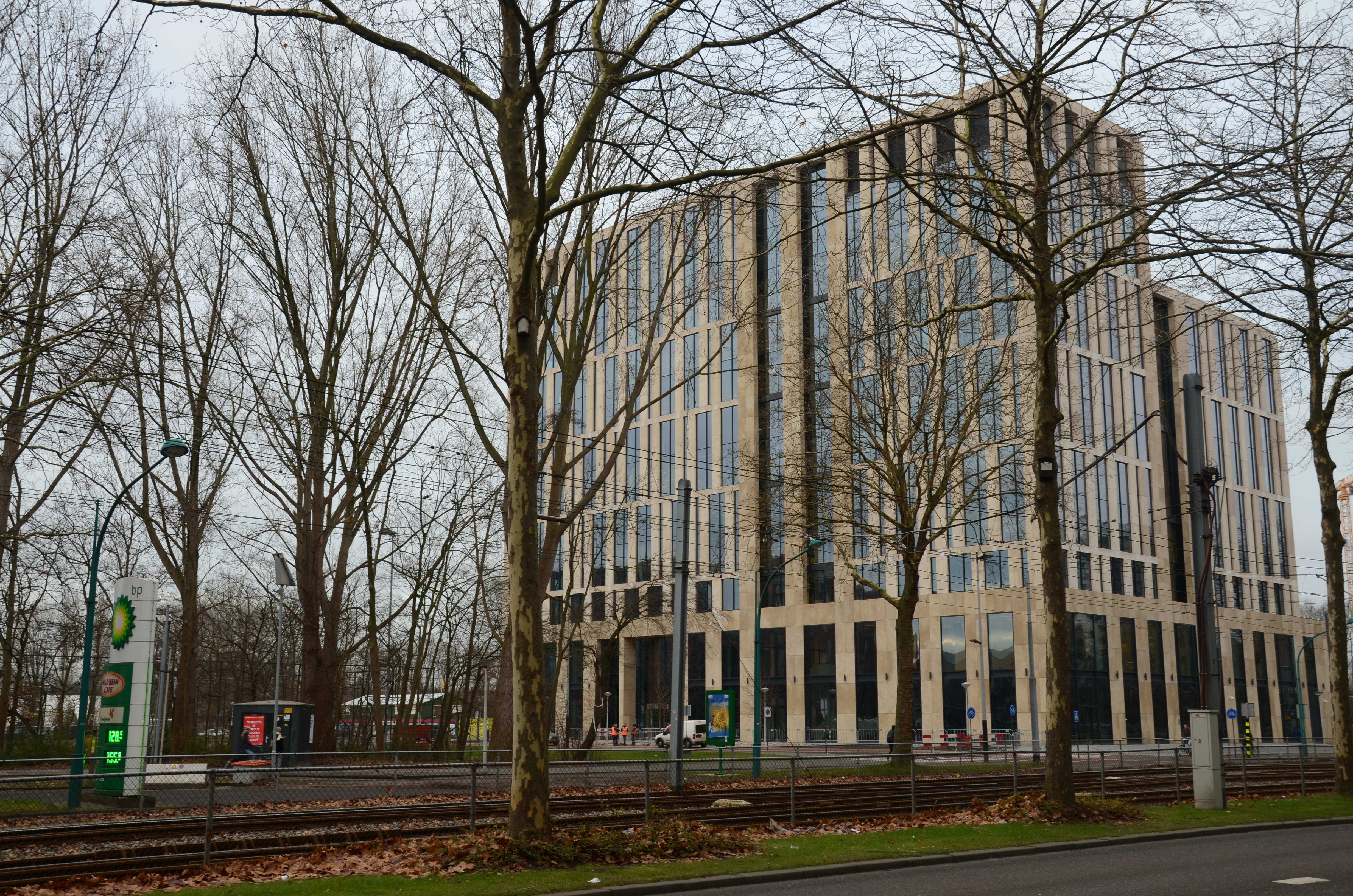 Het Noma-gebouw in Amsterdam.